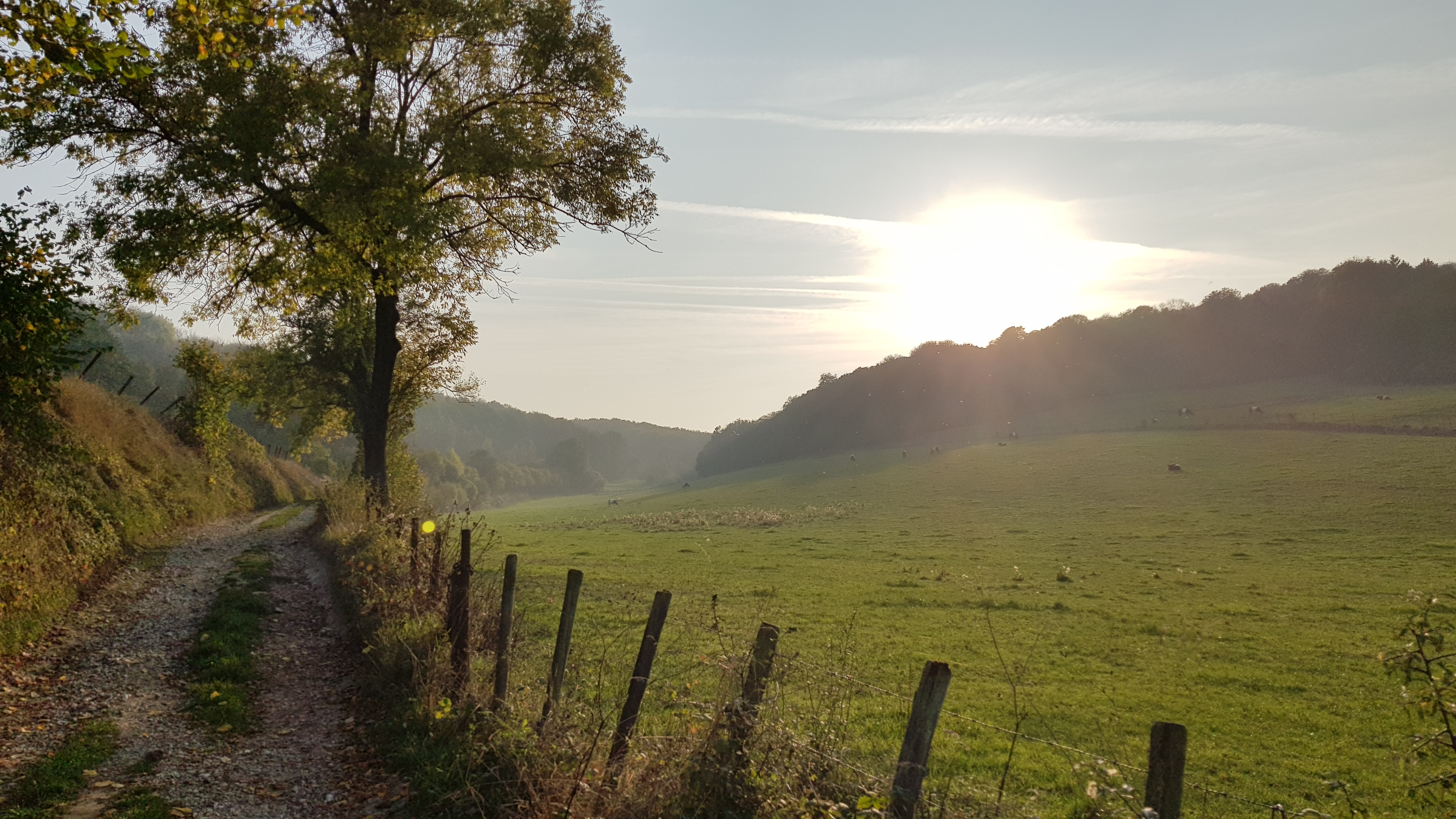 de Abelschegrub bij Stokhem, Wijlre, Gulpen-Wittem, Nederland